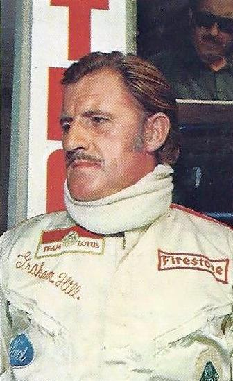 Graham Hill en 1969